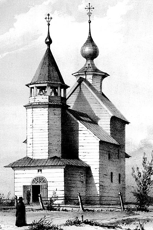 Церковь в селе Деулино (1619 год). Мартынов А.А., Снегирев И.М. Русская старина в памятниках церковного и гражданского зодчества. М., 1857